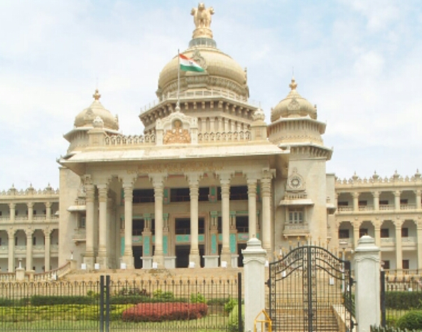 Budova Vidhana Soudha, sídlo zákonodárného sboru státu Karnataka v Indii